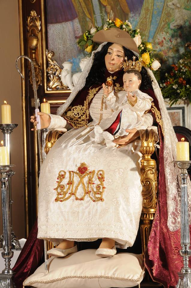 La imagen de la Divina Pastora luciendo un hermoso atuendo tela de raso brocado color beige, en la falda lleva bordada la simbología (M.M, que significa Madre de Misericordia). El manto vino tinto en raso brocado llevando un sobre manto en terciopelo del mismo color con bordados en torchon dorado. Dicho atuendo fue donado por la Zona Pastoral "Sagrado Corazón de Jesús", Municipio Palavecino - Simon Planas, con motivo de la visita Nª 160 de la Imagen de la Divina Pastora a Barquisimeto y de celebrarse el año del Jubileo Extraordinario de la Misericordia...